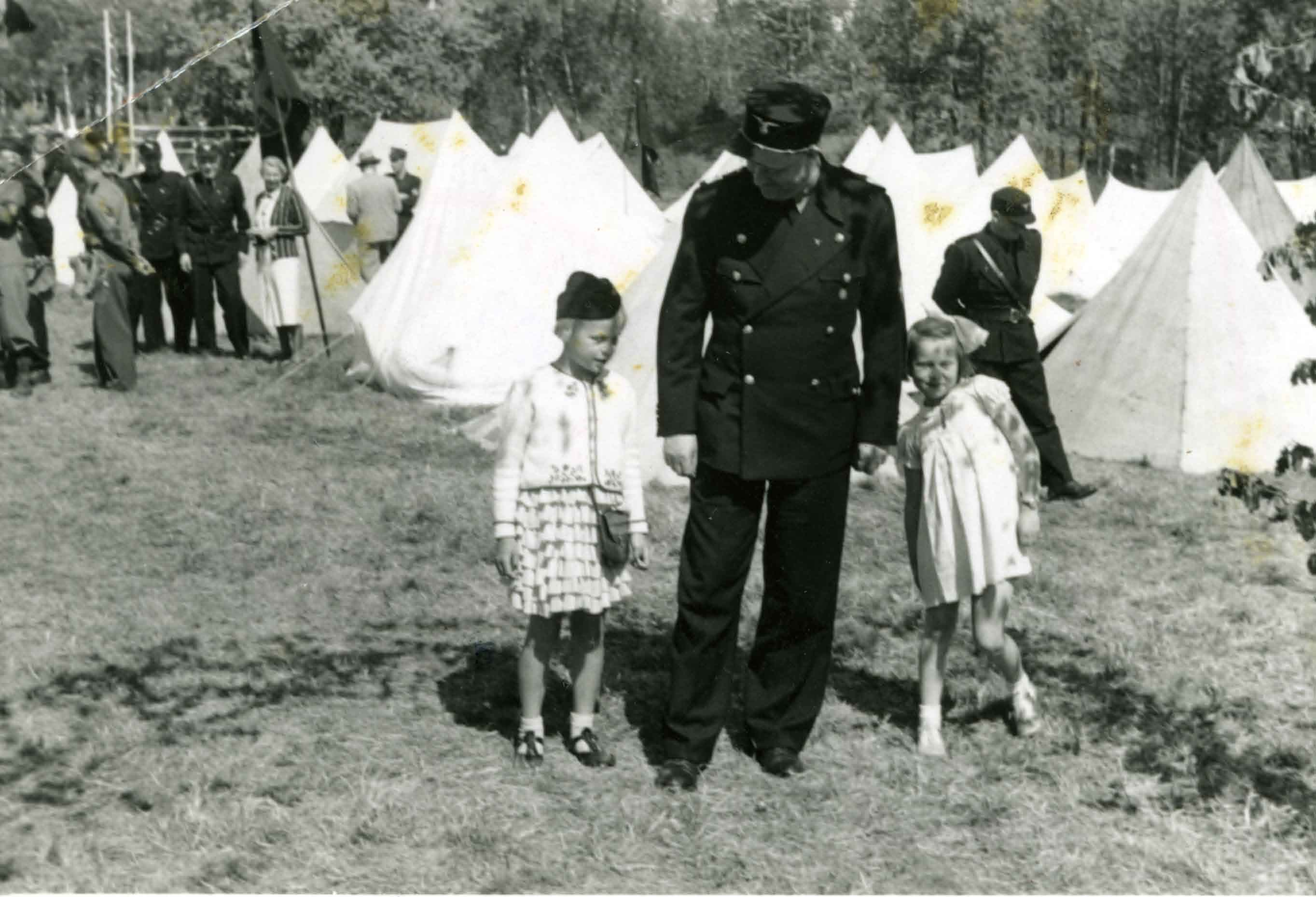 Fotograf: Presse- og propagandaav. Billed- og filmktr. RA/PA-0781/Fa/0001/0112 1153 Nasjonal Samling, forkortet NS, var et norsk politisk parti som ble grunnlagt av Vidkun Quisling i 1933 og ble oppløst ved frigjøringa i 1945. Partiet la seg etterhvert nært opp mot nasjonalsosialismens ideologi og ble støtteorganisasjon for den tyske okkupasjonsmakta i Norge under andre verdenskrig.